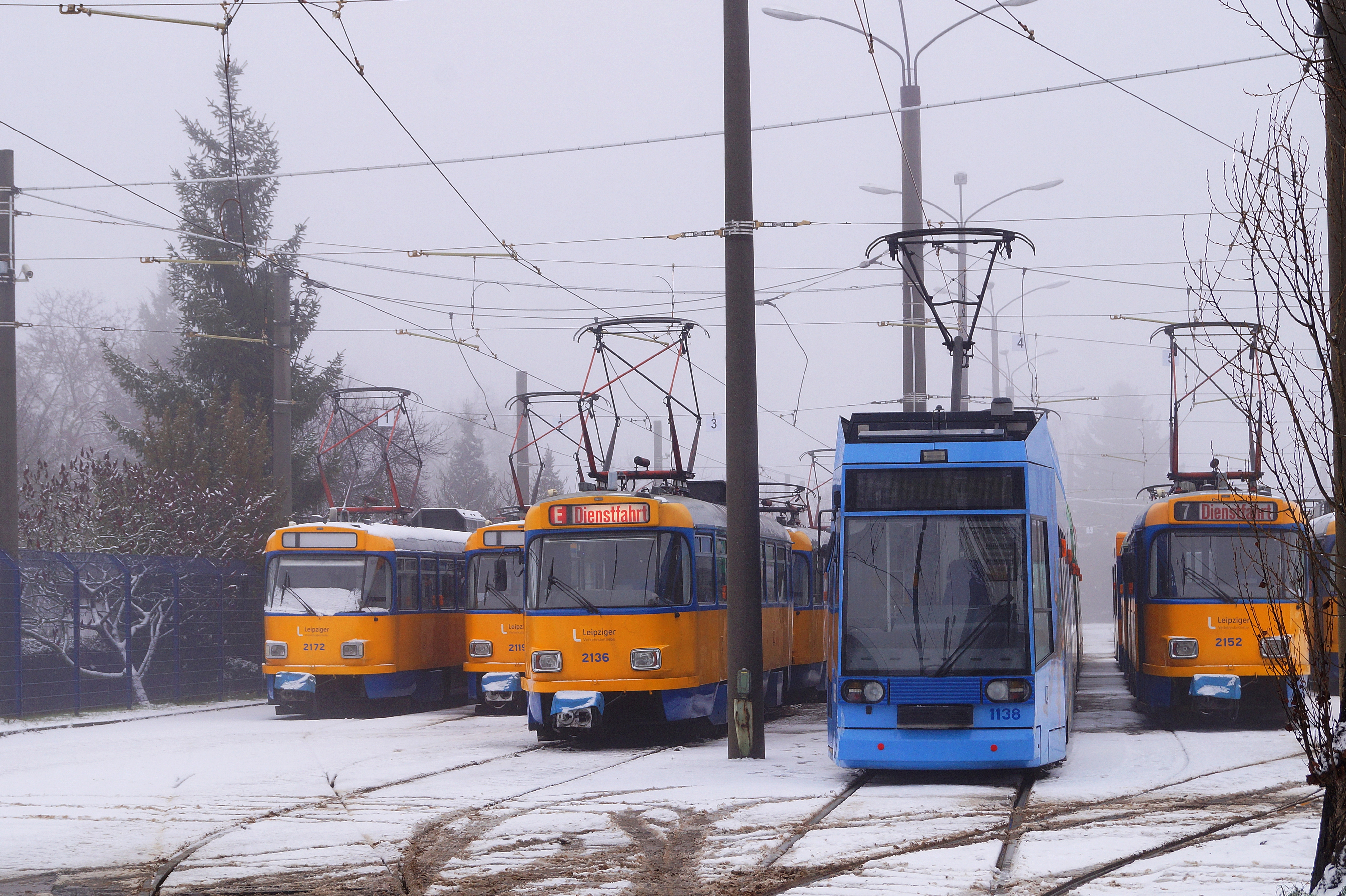 Freiabstellfläche im Strbf. Paunsdorf mit Triebwagen der Typen 33c und 36 (2017)